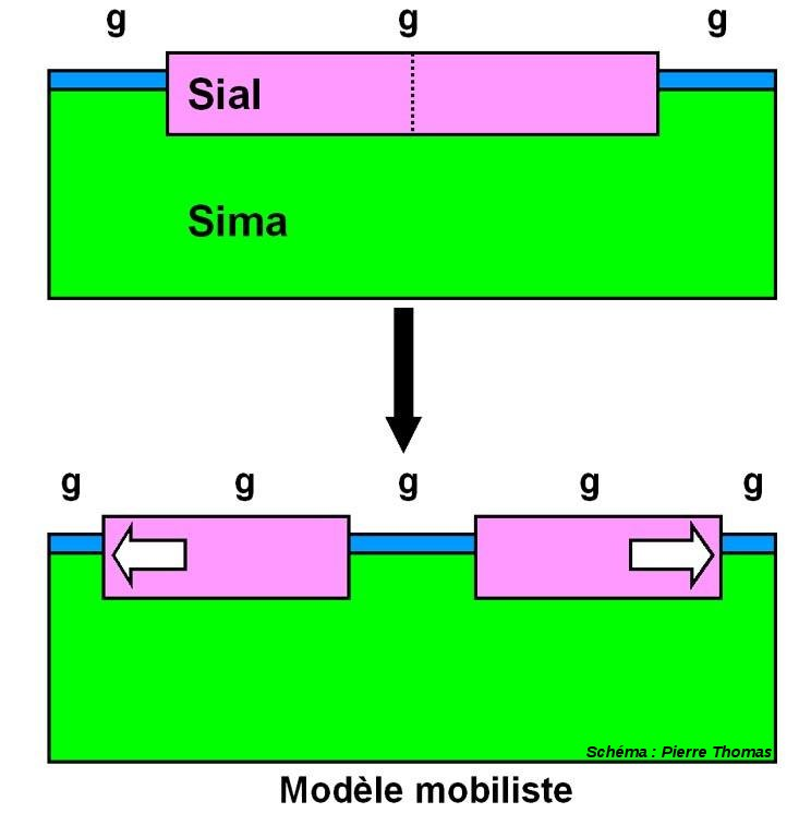 Modèle mobiliste de Wegener dans la tectonique des plaques.